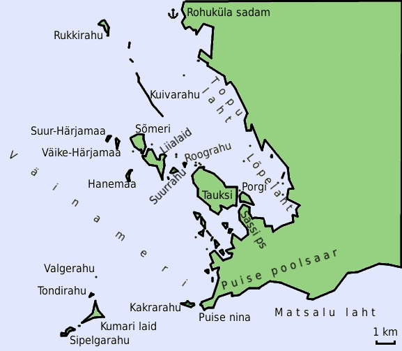 Kaart Rohukülast Sipelgarahuni.